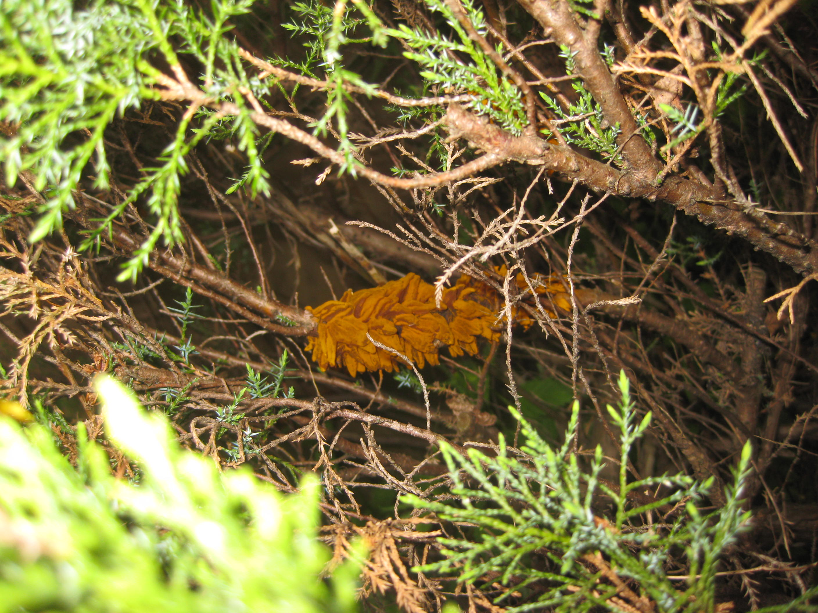 Ruhland, Grenzstraße 3, Birnengitterrost (Gymnosporangium fuscum) auf Wacholder, aufgequollene Sporenlager